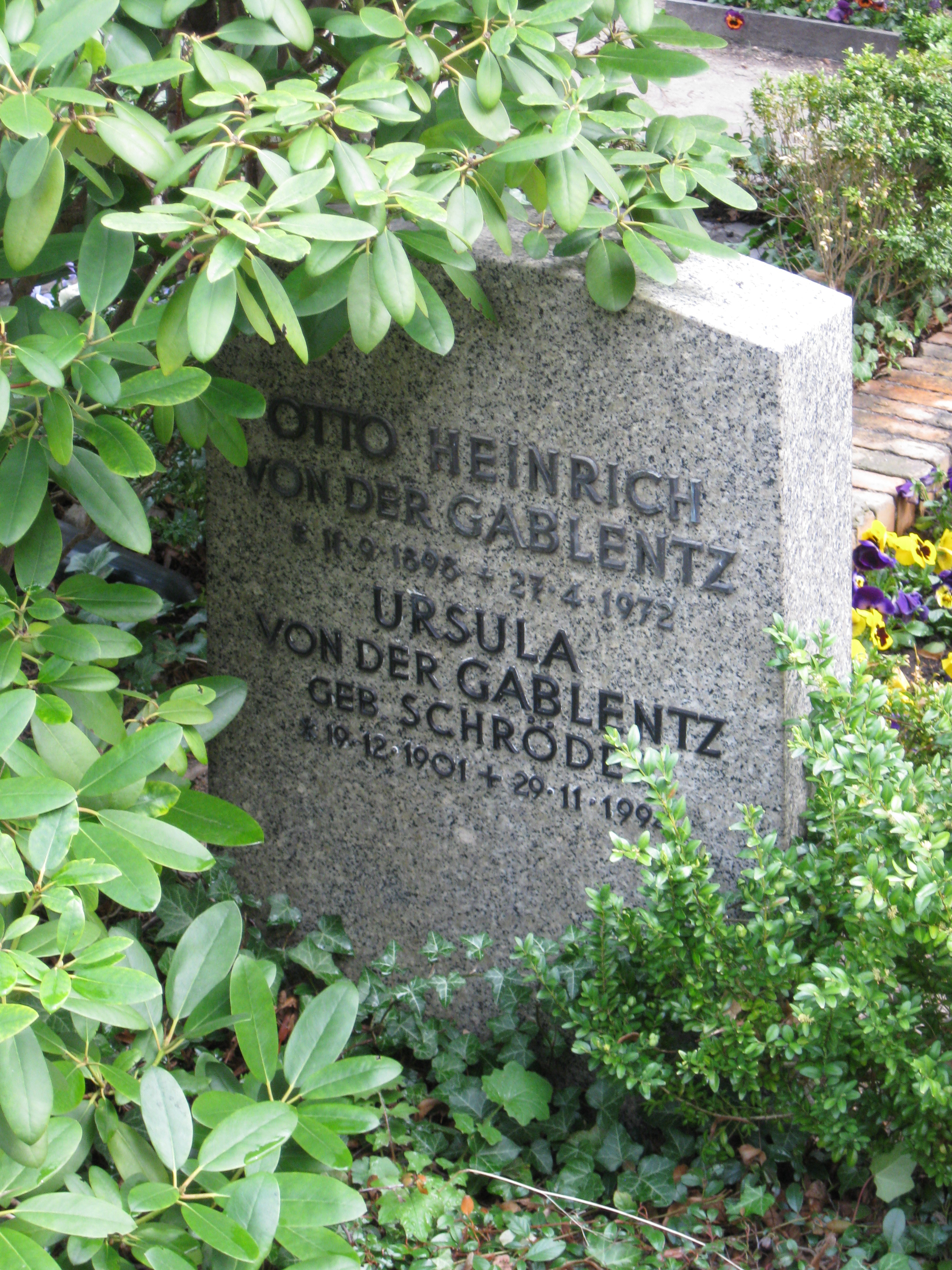 Grabstein St.Annen-Friedhof Dahlem